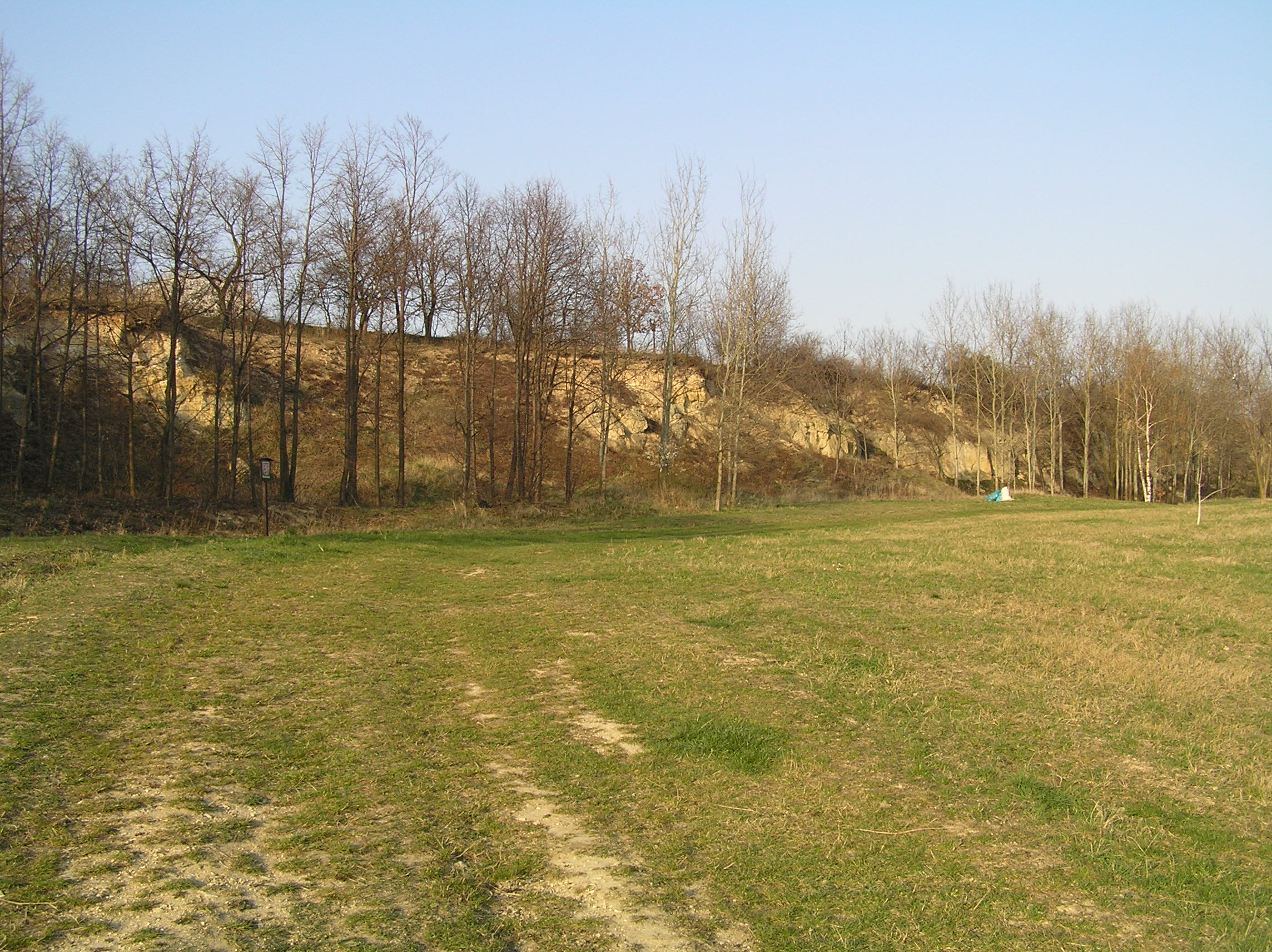 PP Vidoule